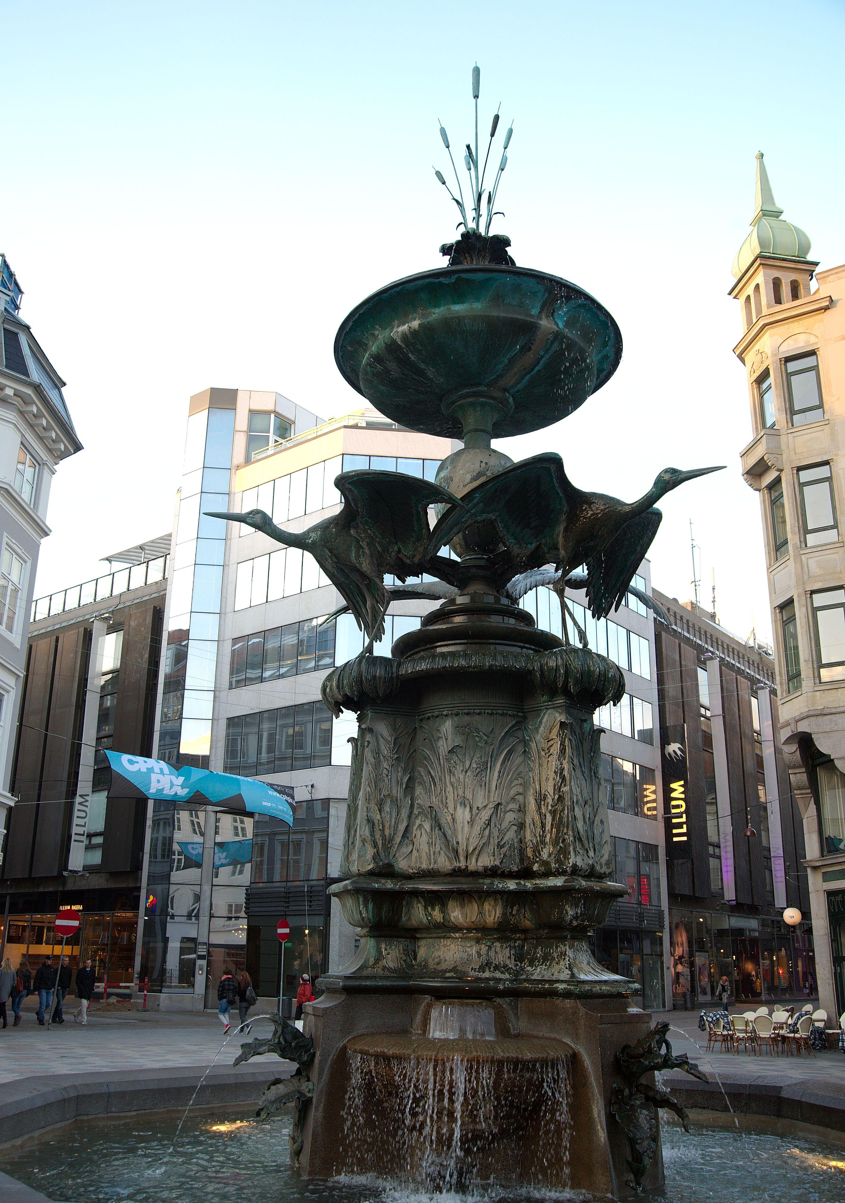 Storkespringvandet